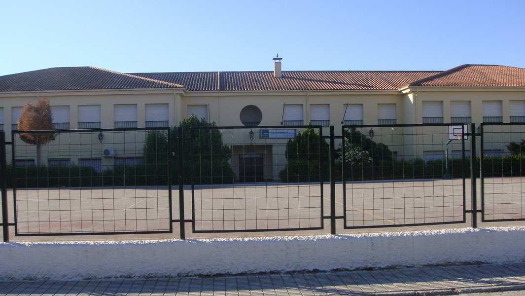 Colegio "Francisca Hurtado", en la localidad de Láchar (Granada, España)